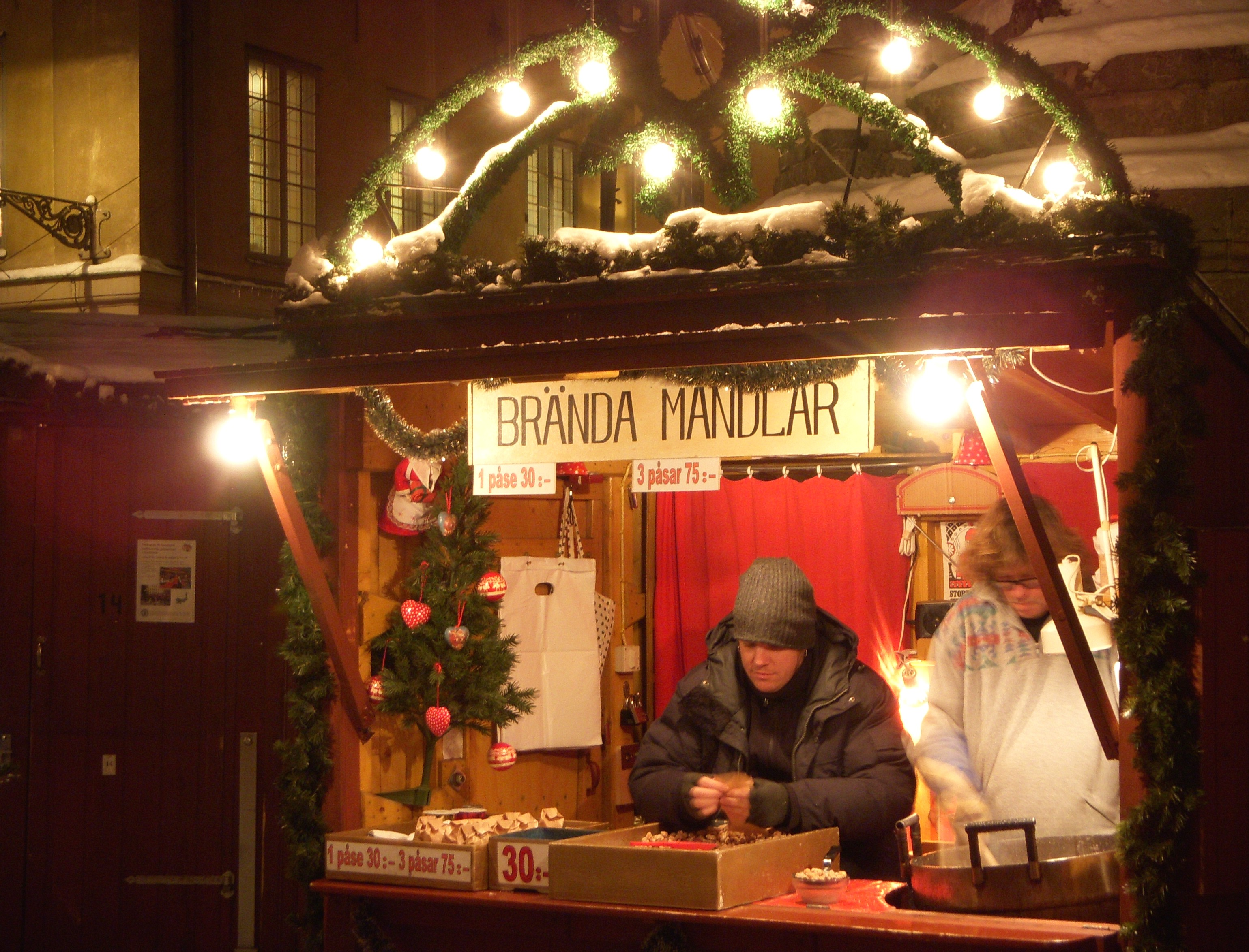 Julmaknad i Gamla stan